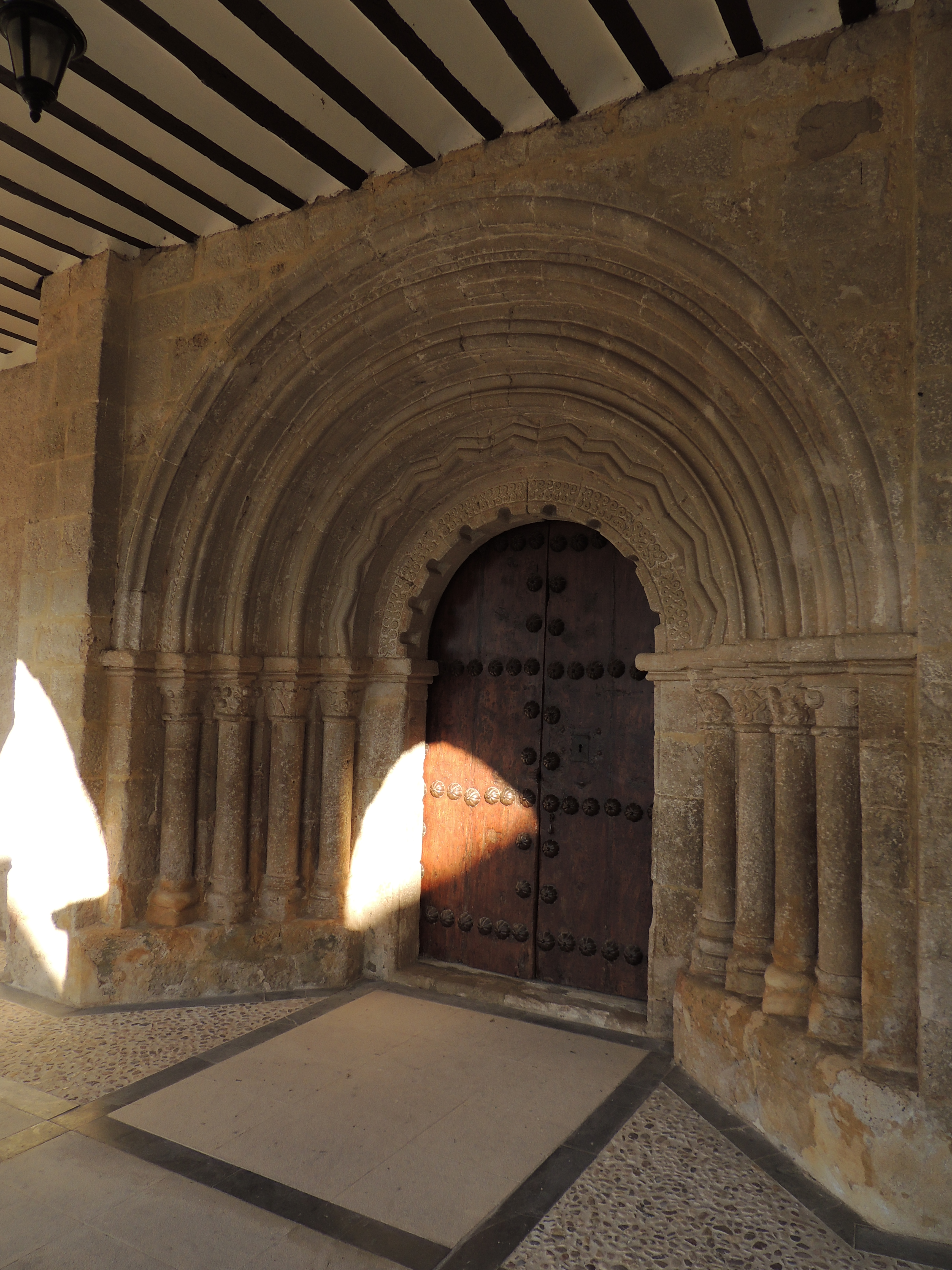 Portada de la iglesia de Santa María Magdalena de Valdeavellano